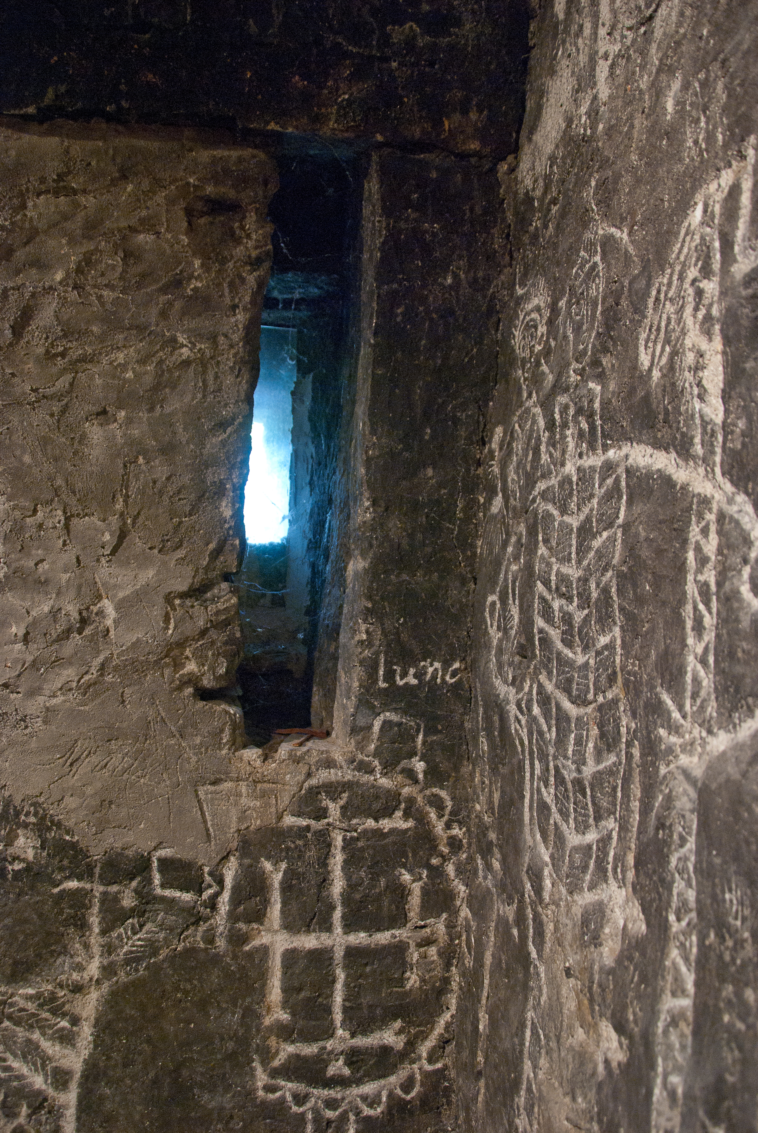 Aspillera y paredes con grabados del interior de la cárcel de Broto.